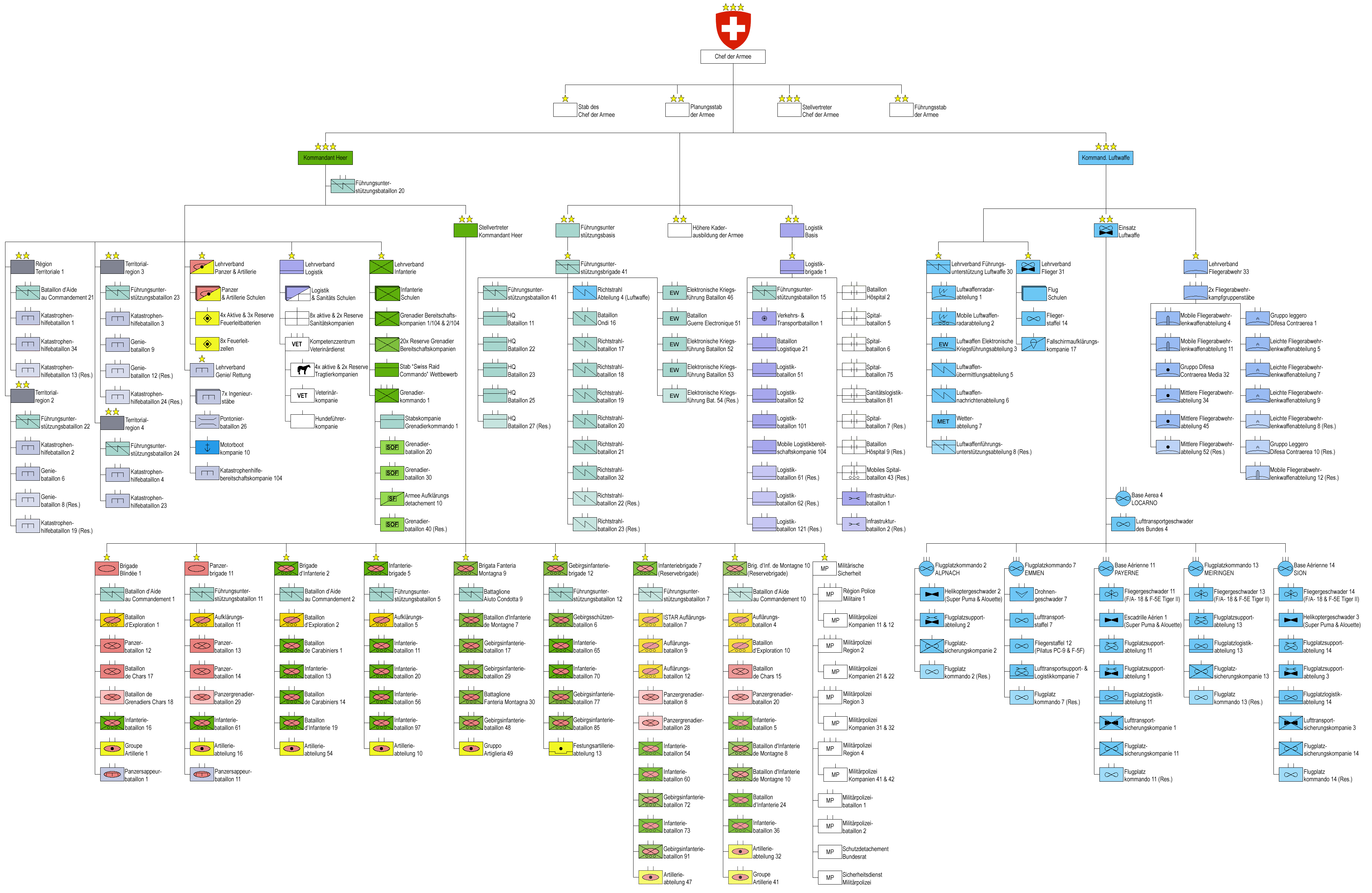 Die Schweizer Armee XXI, selbstgemacht; noclador